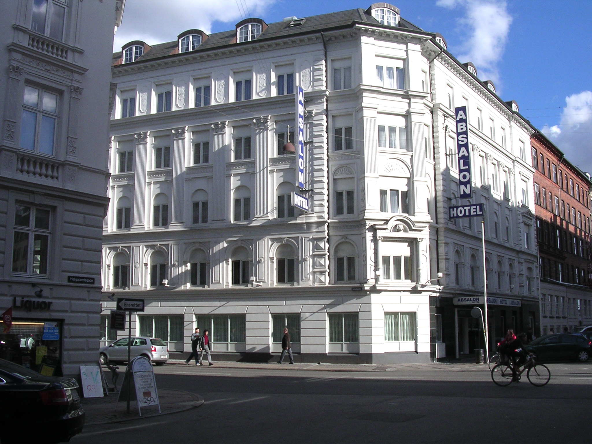 Absalon Hotel on Istedgade in Copenhagen, Denmark